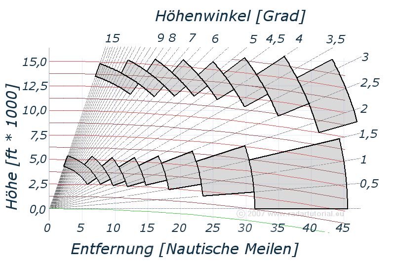 Um für eine CAPPI- Anzeige Wetterradardaten von einem bestimmten Höhenbereich zu erhalten, müssen Daten verschiedener Höhenwinkel und verschiedener Entfernung miteinander verknüpft werden. Zu beachten ist, dass bei einer Halbwertsbreite des Antennendiagrammes eine Begrenzung auf (hier) 1,5° erfolgt und deshalb in großer Entfernung die Anzeige ungenauer wird. In der Realität ist eine feinere Strukturierung als hier symbolisch gezeigt, durch Interpolation möglich. Durch die Überhöhung (vertikaler Maßstab ist ungleich dem horizontalen Maßstab) ist die Anzeige der Höhenwinkelgeraden nicht linear und deshalb sehen die verschiedenen Volumina übertrieben verdreht aus. Die Höhenangabe von 15.000 Fuß (etwa 5000 m) auf der Ordinate (Y-Achse) nimmt hier in der Grafik eine fast sechs Mal so große Strecke in Anspruch, als die 5 km auf der Abszisse (X-Achse). Stellen Sie sich vor, dass in der Realität das ganze Diagramm so flach gequetscht wird, dass die Winkelgerade mit dem Namen „15 Grad“ wirklich einen Winkel von 15° zur Horizontalen einnimmt und das Diagramm als lineare Grafik dann höhenmäßig etwa bei der Marke 2,5·1000 Fuß beendet ist.